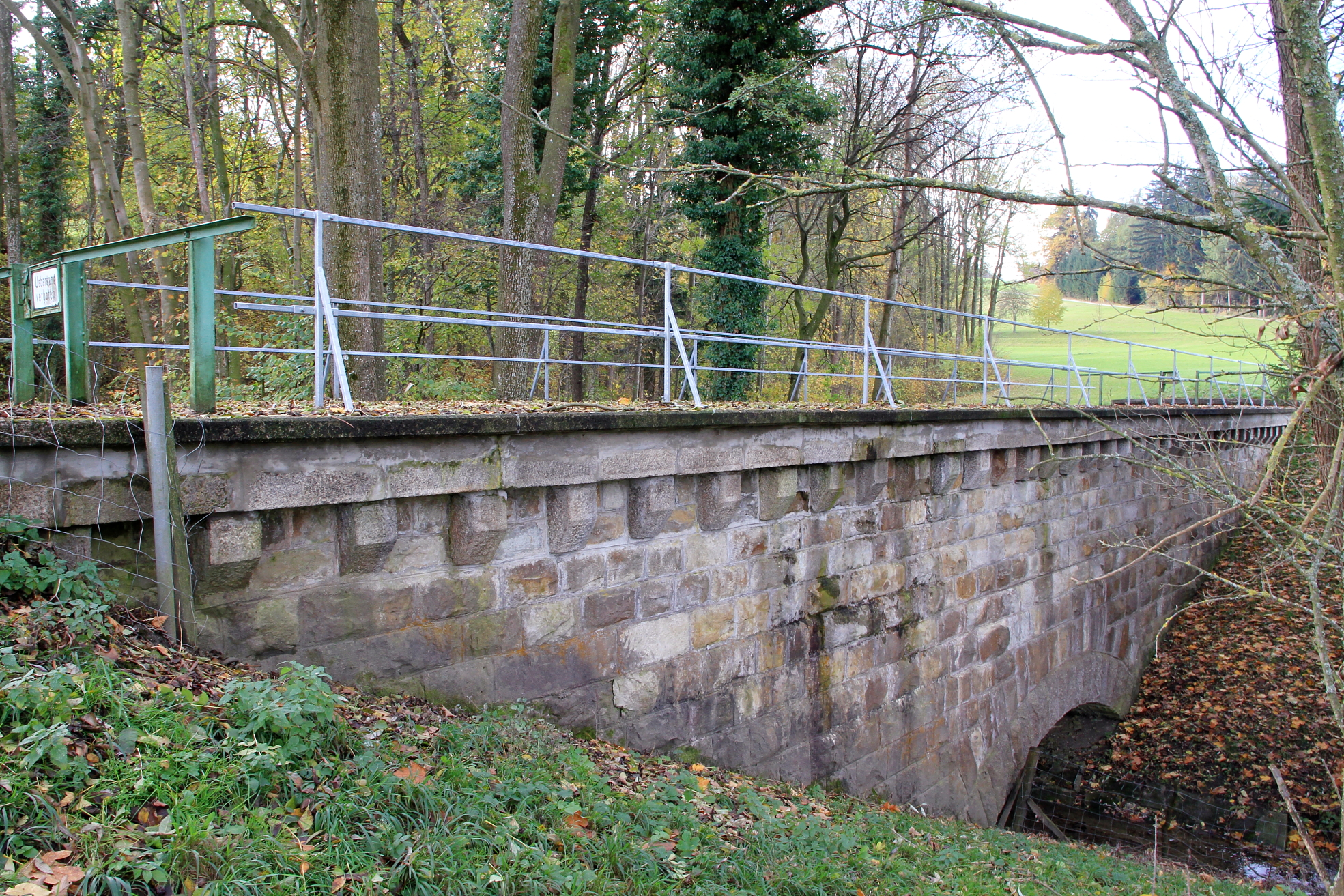 Kanalbrücke nächst Zehethof (Grundstücksnr. 879; 933/2; 1156) der II. Wiener Hochquellenwasserleitung in der niederösterreichischen Marktgemeinde Oberndorf an der Melk. Die II. Wiener Hochquellenwasserleitung, eine 183 Kilometer lange Wasserversorgungsleitung für die Stadt Wien, wurde auf Betreiben von Karl Lueger errichtet und nach zehnjähriger Bauzeit am 2. Dezember 1910 als II. Kaiser-Franz-Josef-Hochquellenleitung eröffnet.